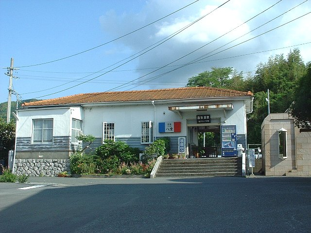 天竜浜名湖鉄道 西気賀駅 駅舎 2005年5月26日 Bakkai撮影